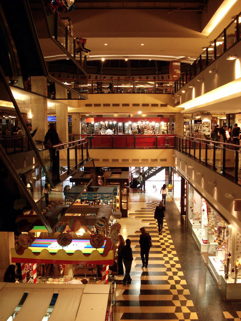 Interior del shopping Patio Olmos, Córdoba, Argentina.